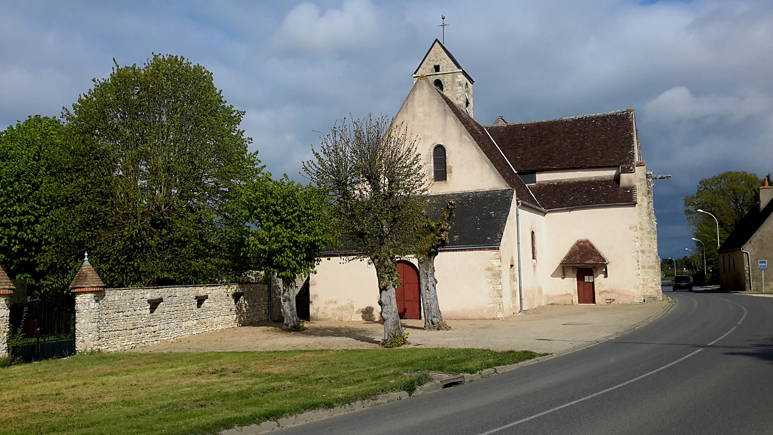 L'église Saint Martin, Juranville, Loiret, France.